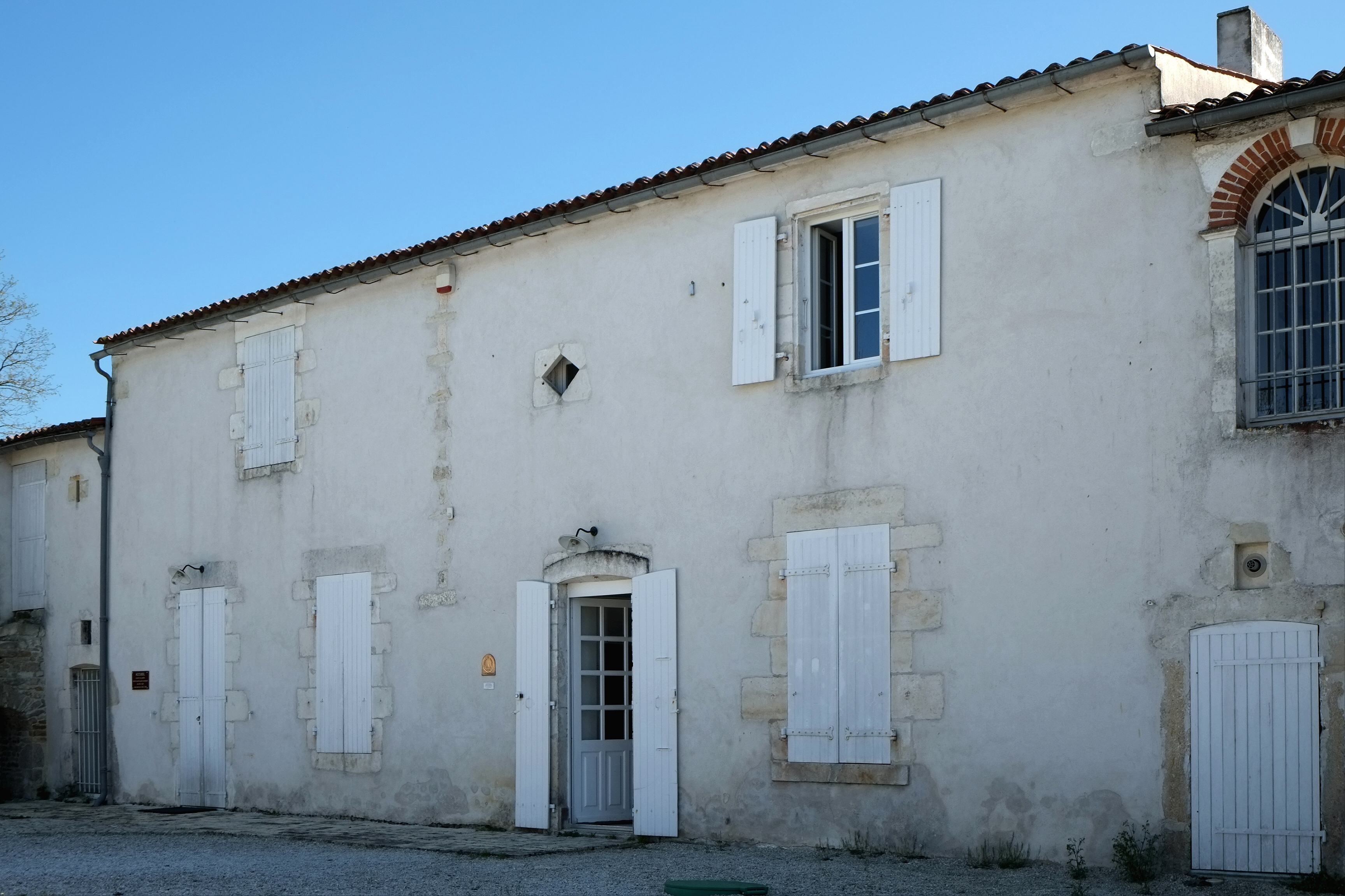 Mairie dans le bâtiment de l'ancienne cure accolée à l'église Saint-Médard Charente-Maritime France